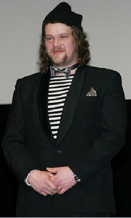 Вилле Хаапасало